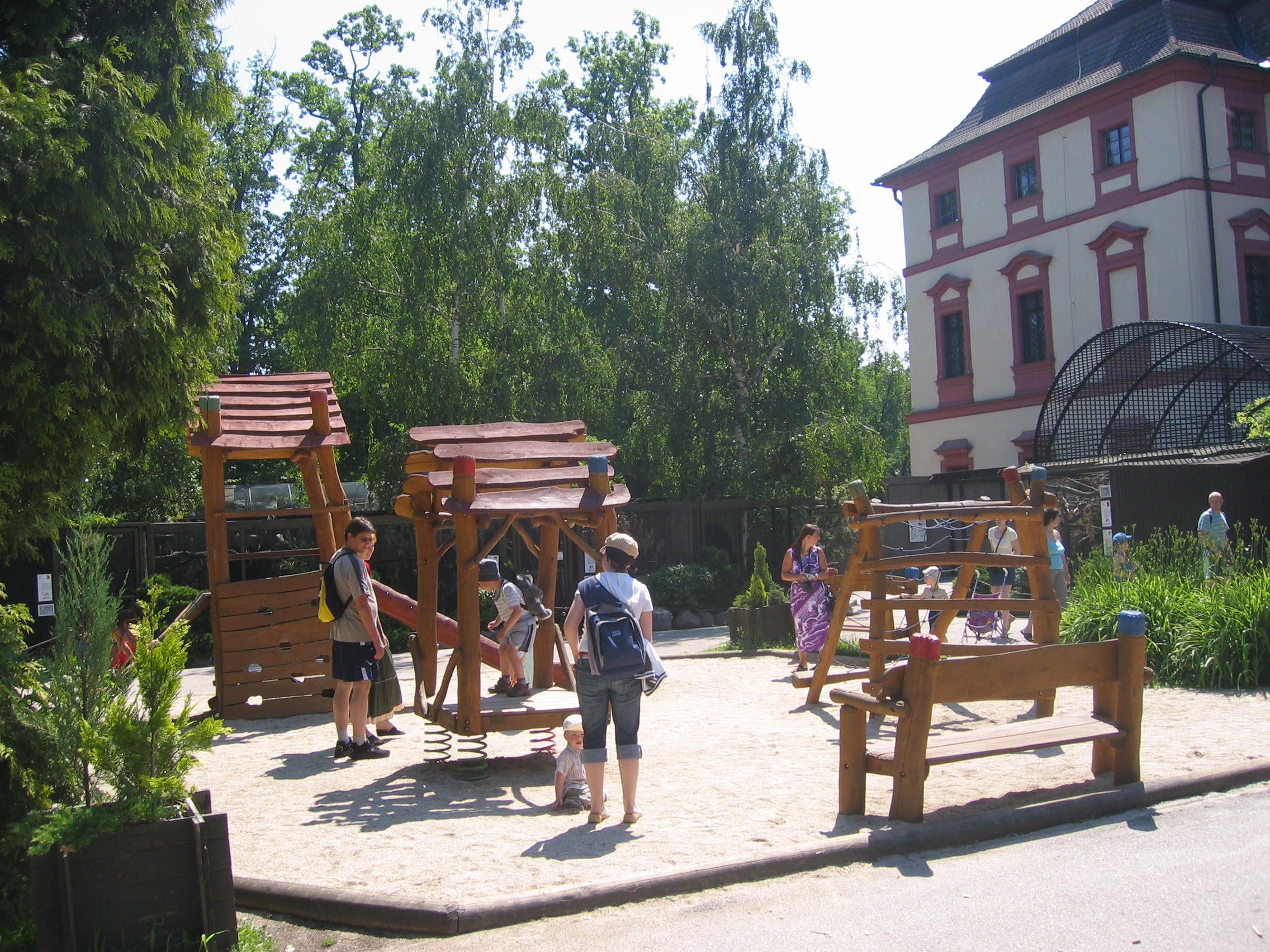 Ĉaskastelo Ohrada kun infanludejo en apuda bestoĝardeno (Ĉeĥio, Sudbohemia regiono) Kategorio:Bildoj de Ĉeĥio